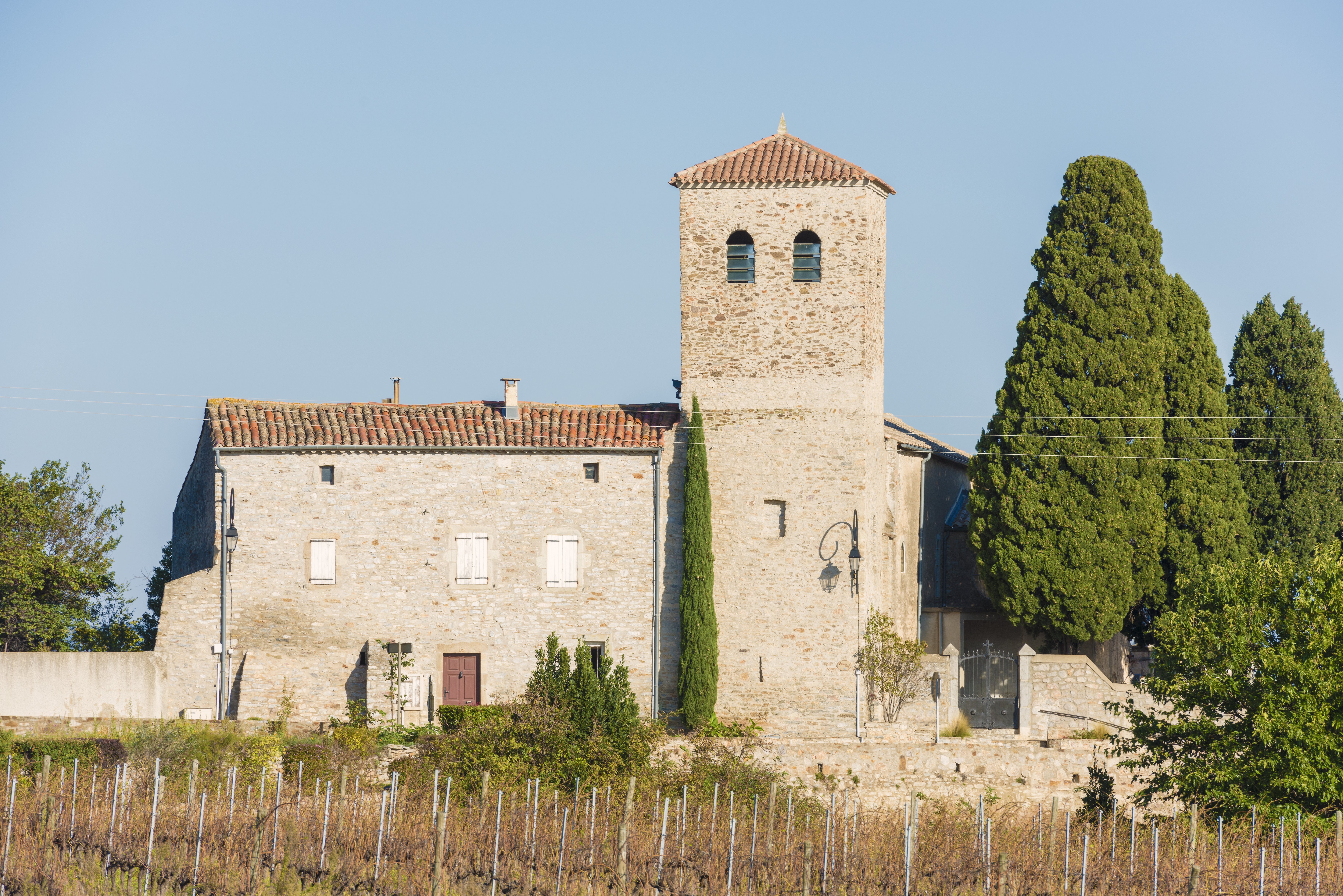 Église de Saint Etienne de Caussiniojouls. Caussiniojouls, Hérault, France.